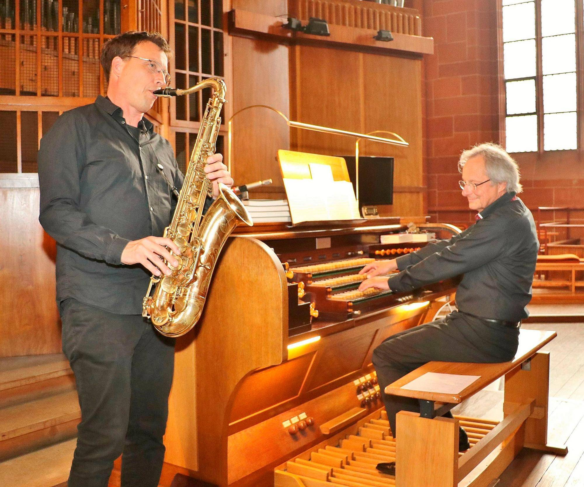 Uki Kammerer und Wolfgang Schröter 2020